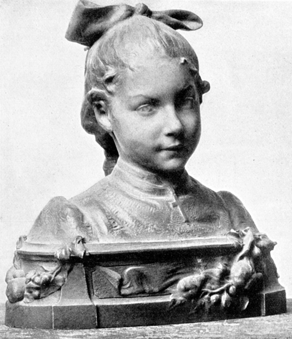 Martin Schauß, Berlin: Ivonne, Mädchenkopf aus gefärbtem Wachs, 40 cm hoch, entstanden in Paris 1894.